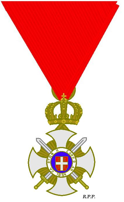 Orde van Karageorge met de zwaarden aan oorlogslint